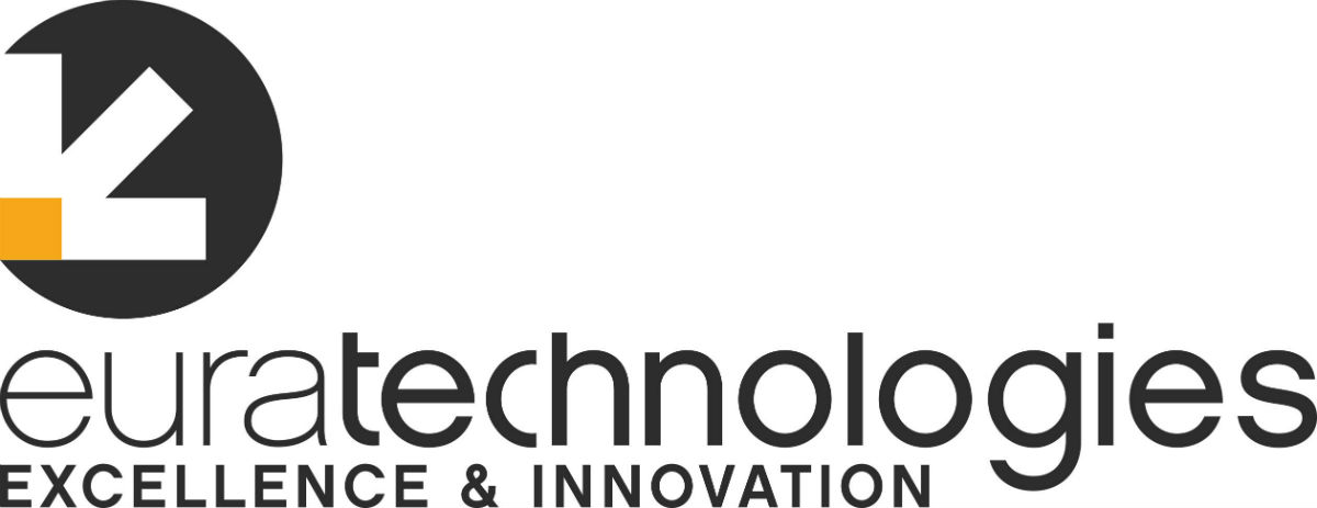 Euratechnologies : incubateur et accélérateur de startups à Lille, France